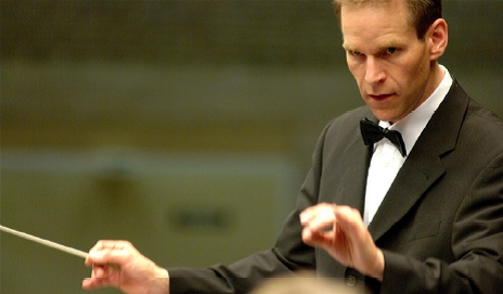 Ulrich Schmidt - Künstlerischer Leiter von Westfalen Winds